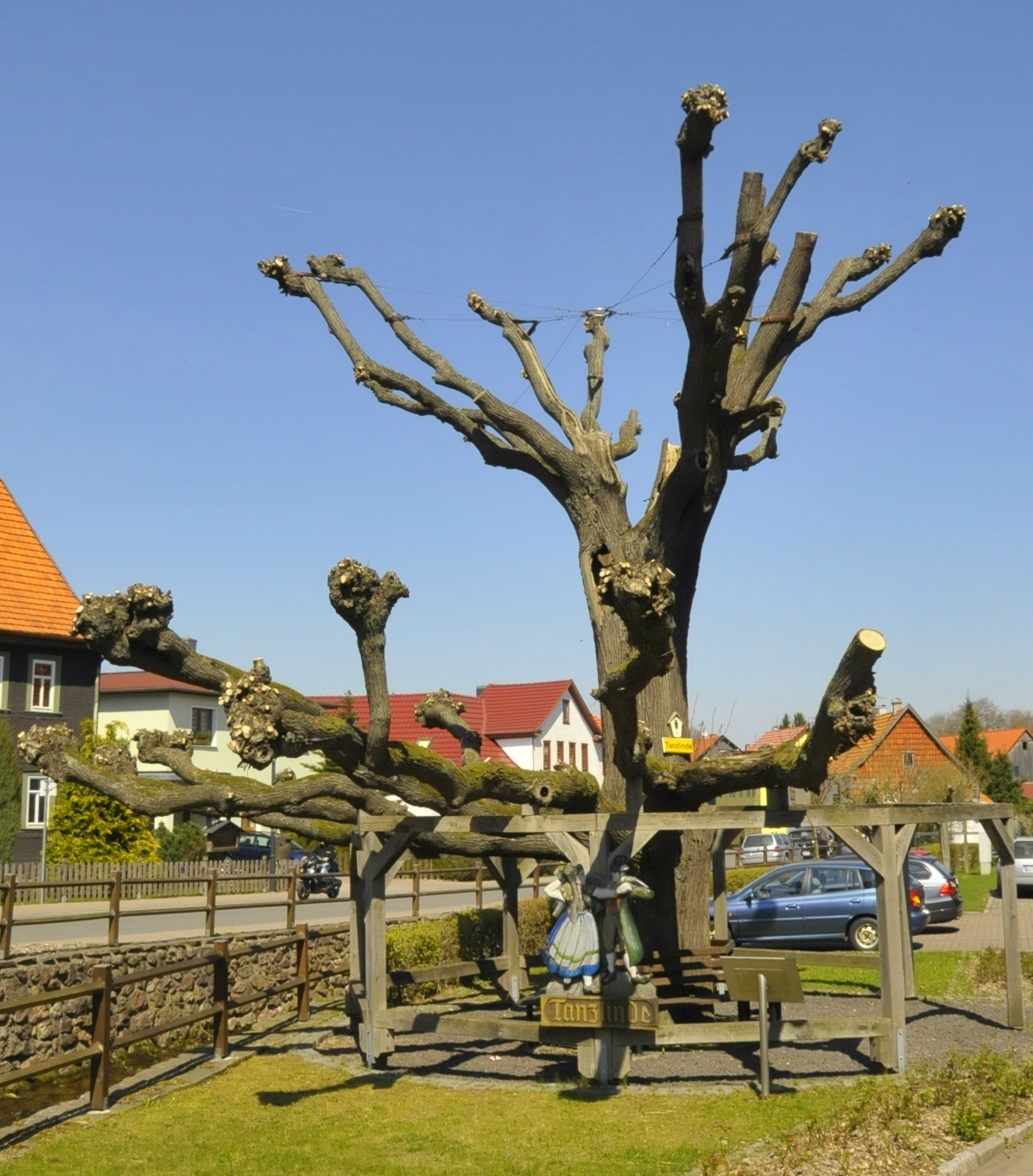 Tanzlinde in Tabarz, April 2015